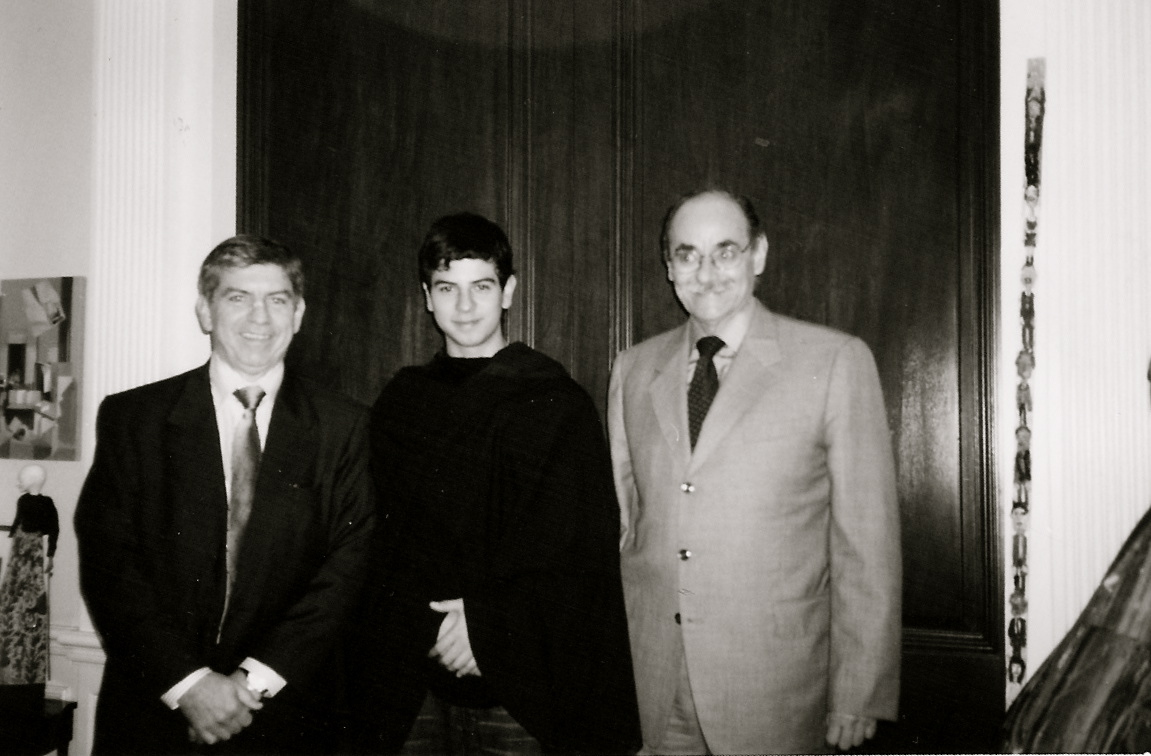 Julian de la Chica durante su recital en la OEA en compania del ex presidente de Colombia y secretario general de la OEA DR. Cesar Gaviria Trujillo